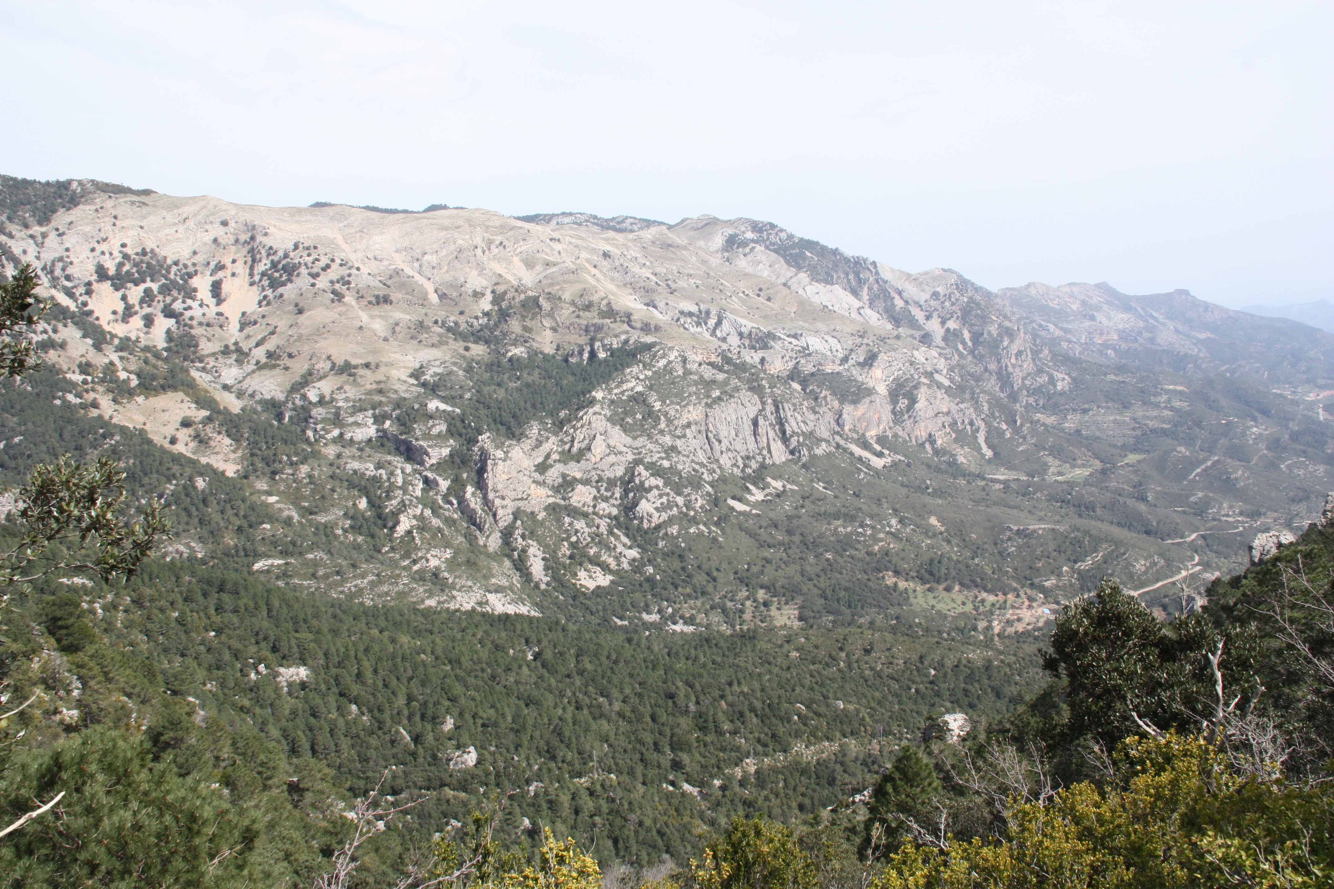 Serra situada entre els municipis d'Alfara de Carles (Baix Ebre) i el de l'Horta de Sant Joan (Terra Alta)